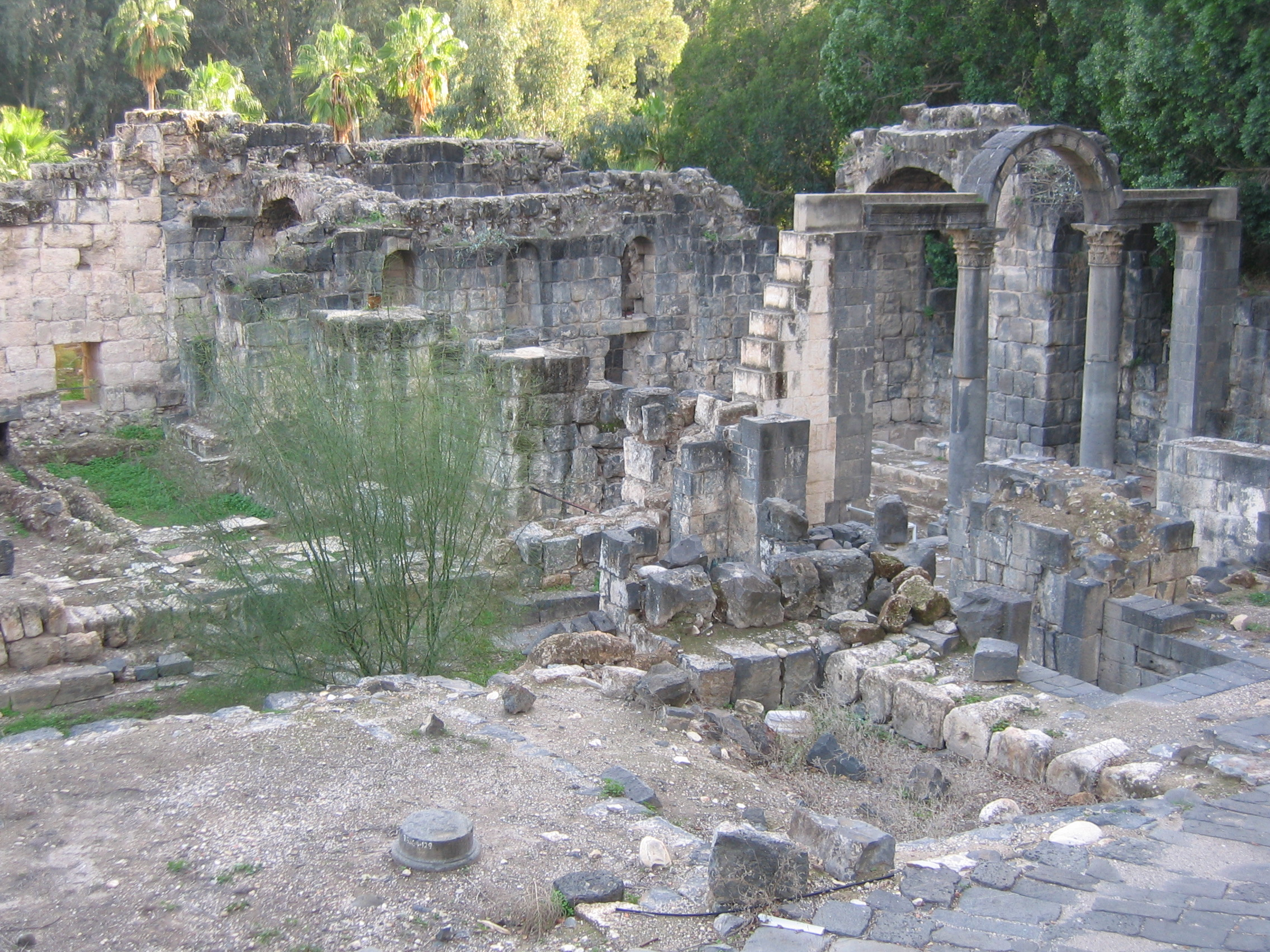 Ancient ruins Hamat Gader Hamat Gader